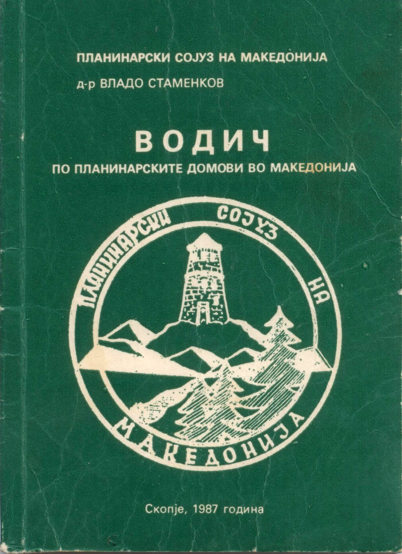 Корица на книгата "Водич по планинарските домови во Македонија" од Д-р. Владо Стаменков